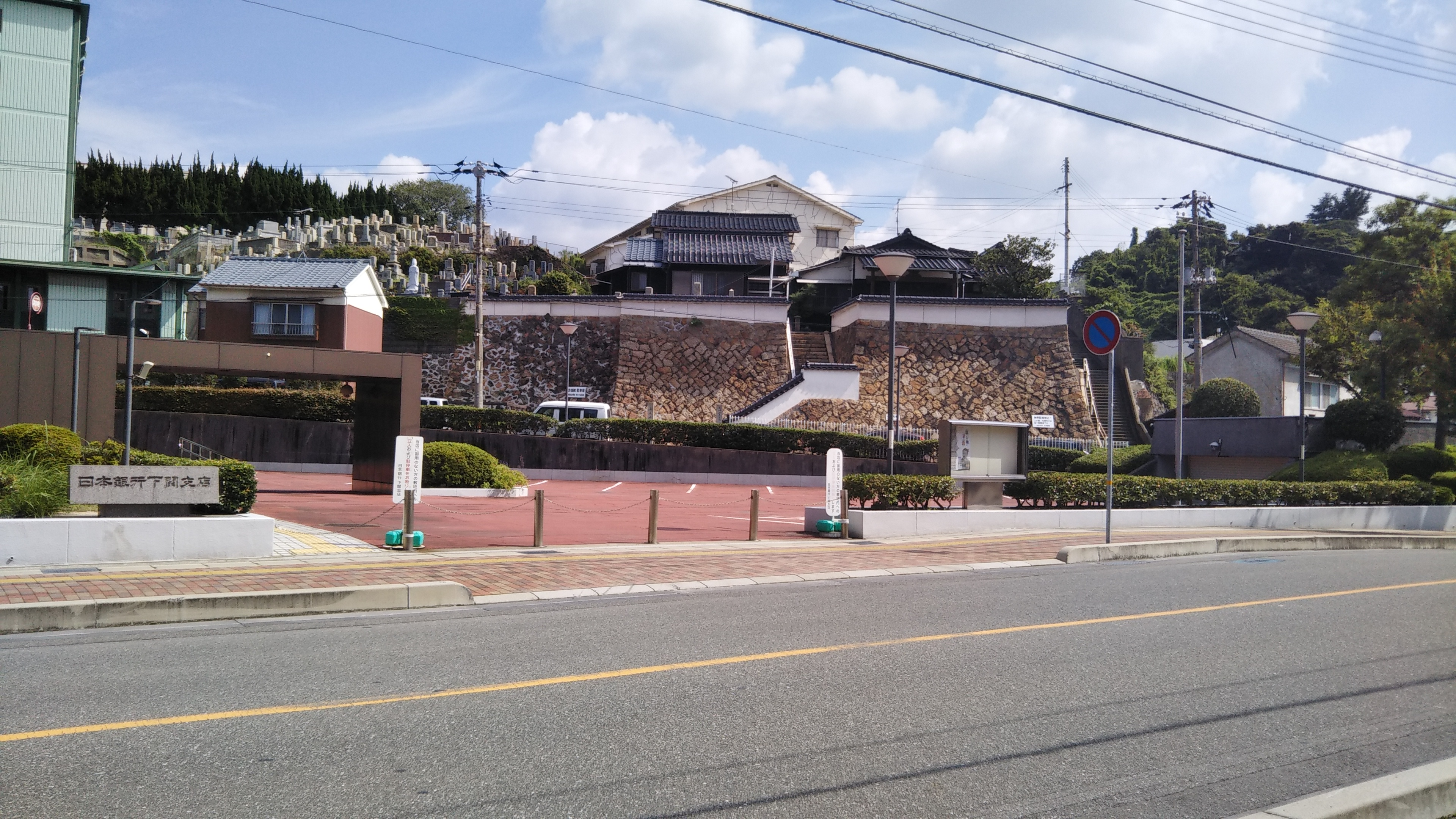 下関市岬之町にある日本銀行下関支店入口と高野山真言宗功徳院。2019年8月31日岬之町で撮影。